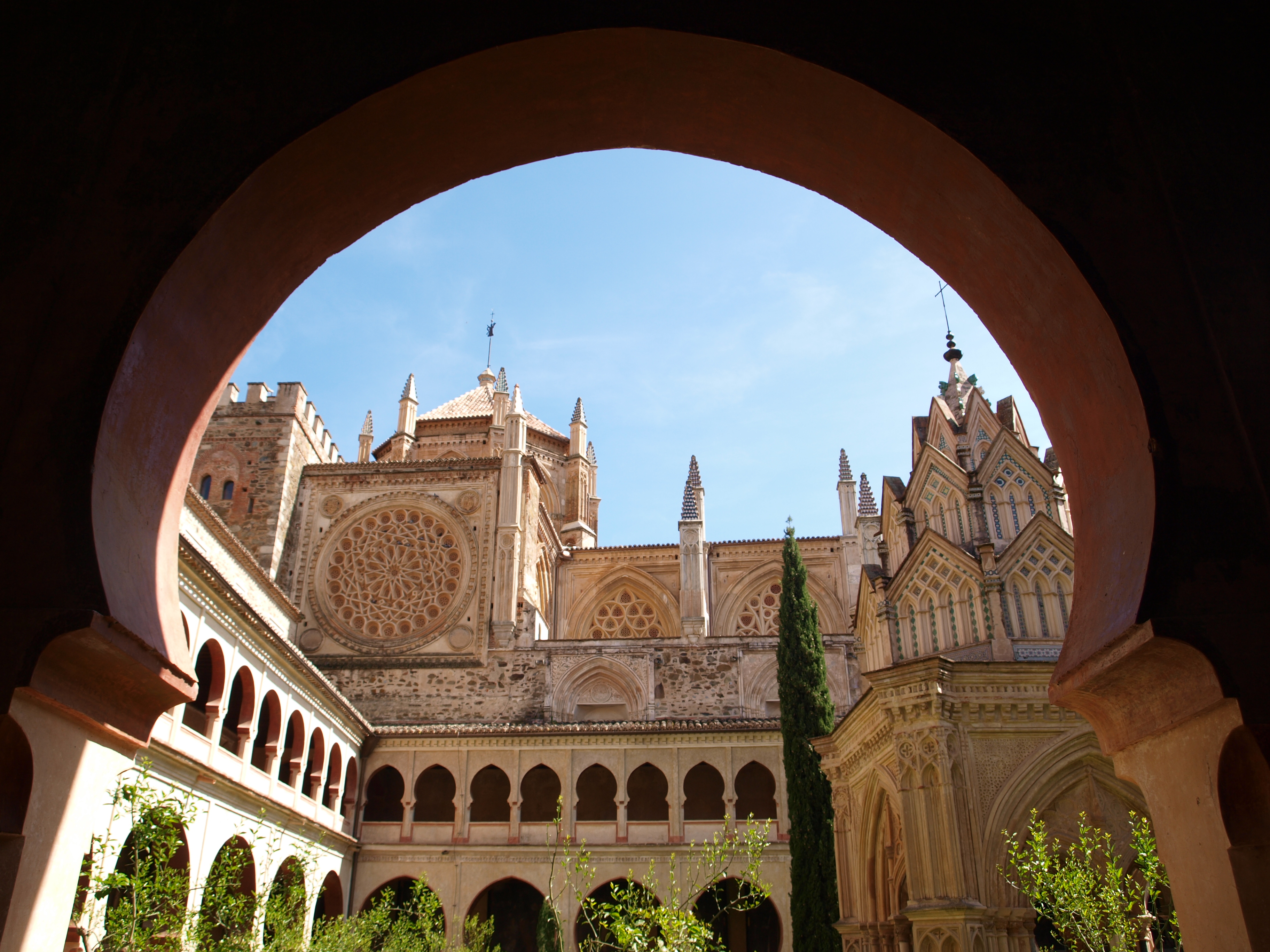 Vista del claustro, templete e iglesia del Monasterio de Guadalupe